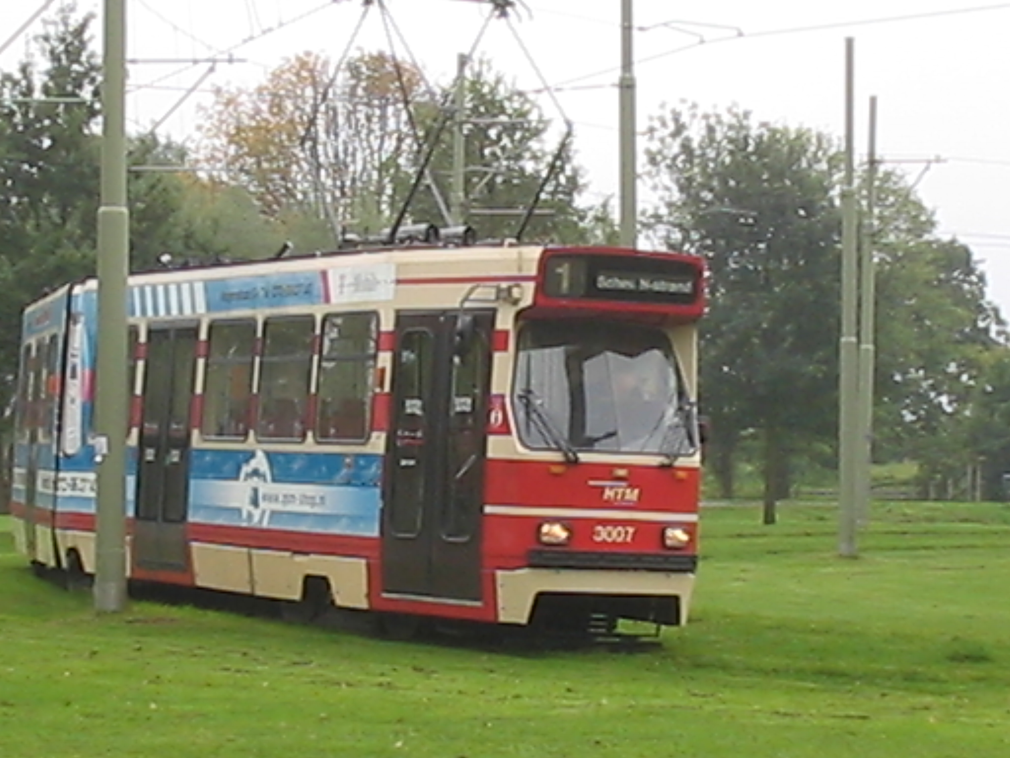 Den Haag/Delft, Tram 1, keerlus Delft Tanthof, 19 oktober 2005 Picture taken and uploaded to nl.wikipedia by M.Minderhoud (User:Michiel1972), 19 oktober 2005